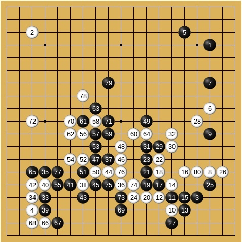 245手完 黒7目半勝ち